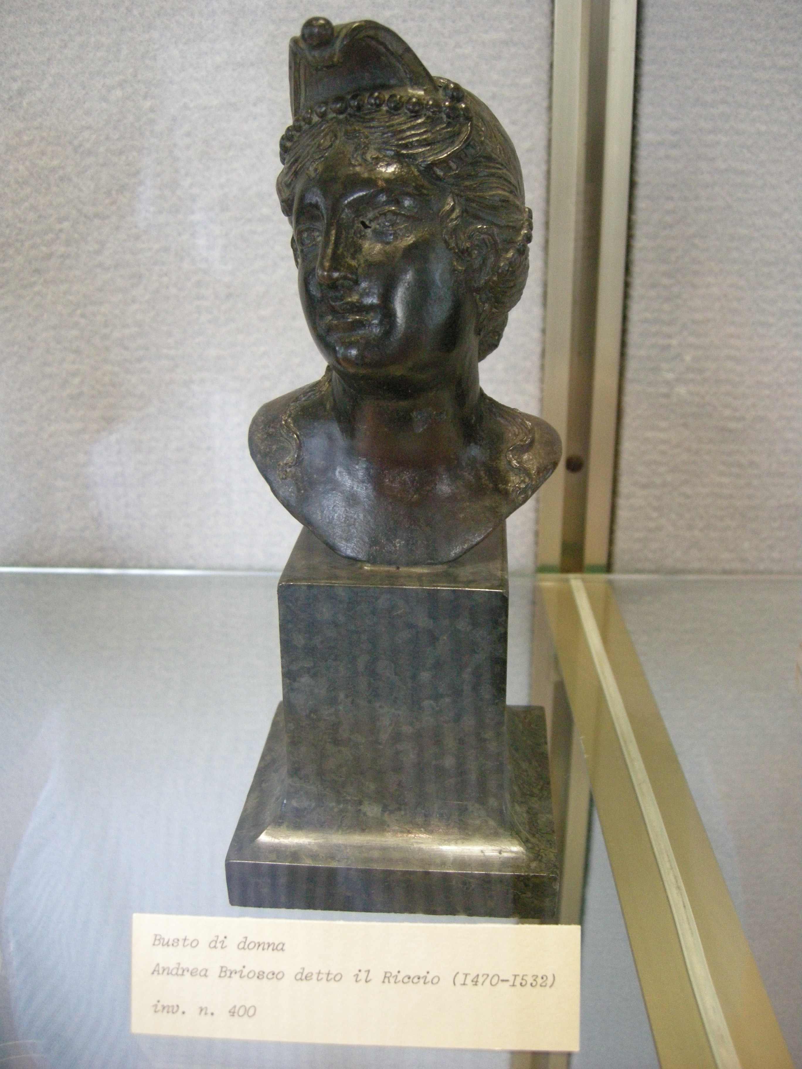 Andrea briosco (il riccio), busto di donna